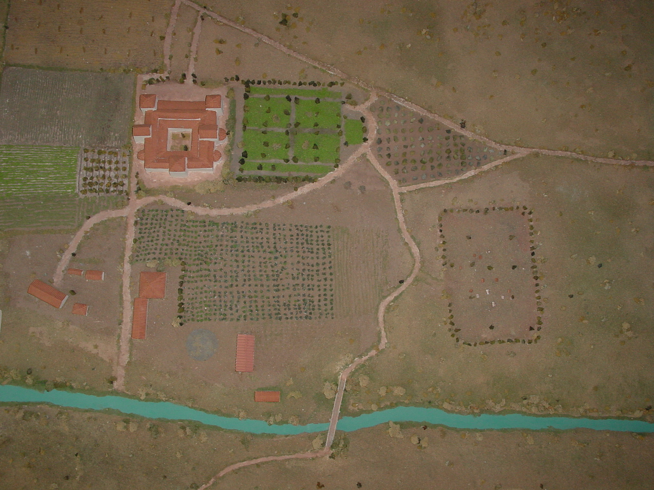 Villa romana de Almenara de Adaja, provincia de Valladolid (España). Maqueta que ofrece una idealización de la zona geográfica en que se encuentra la villa.